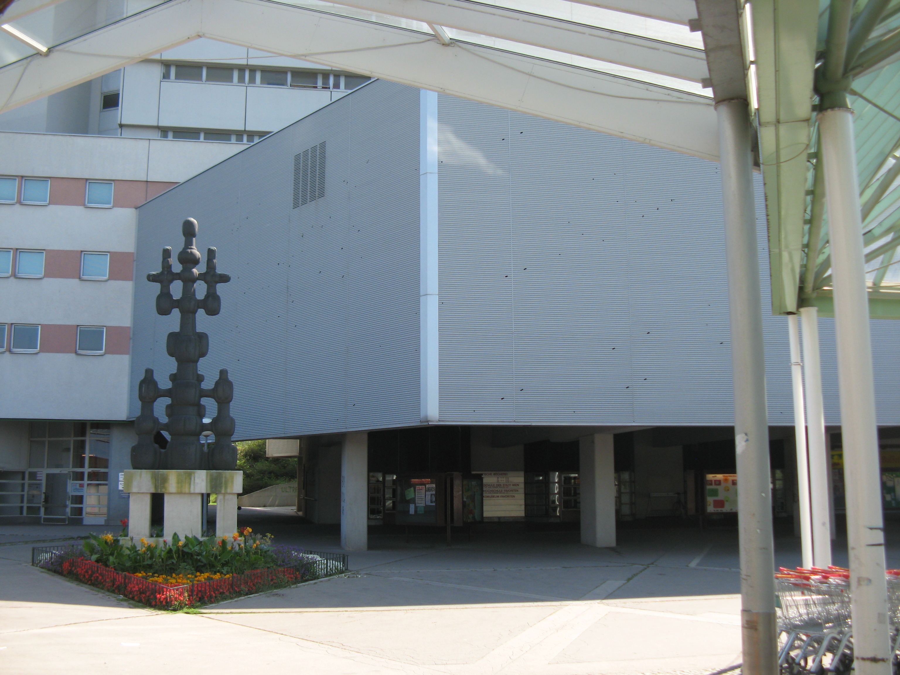 Haus der Begegnung, Ada-Christen-Gasse 2C, Wien-Favoriten